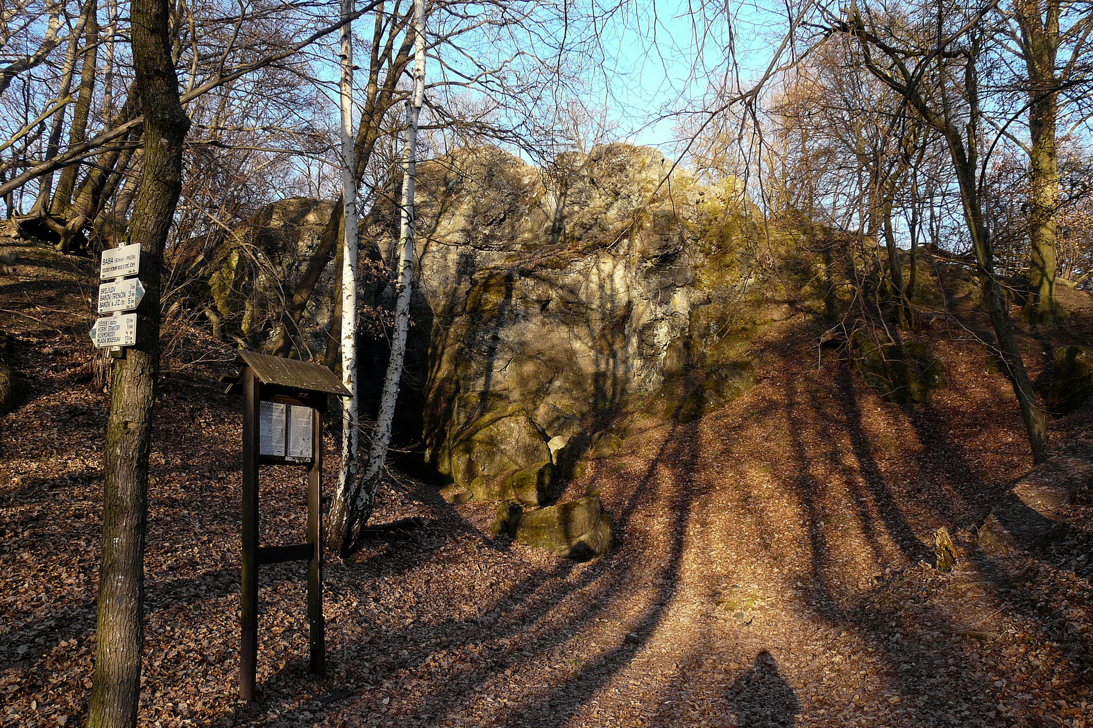 Čedičový masiv Baby